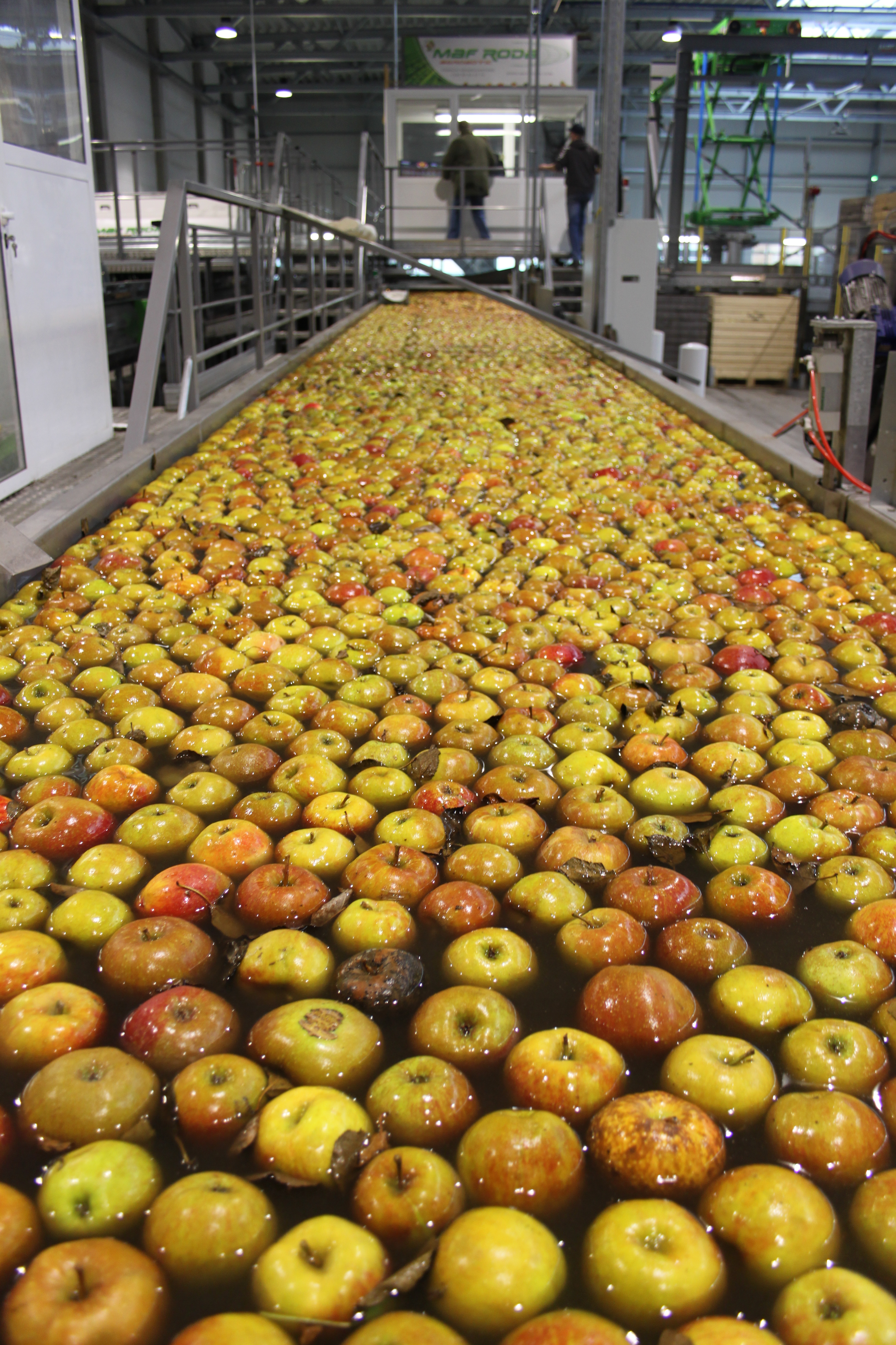 Äpfel auf der Zuführstrecke einer Sortieranlage mit Wasserentleerung (Elbe-Obst Jork)